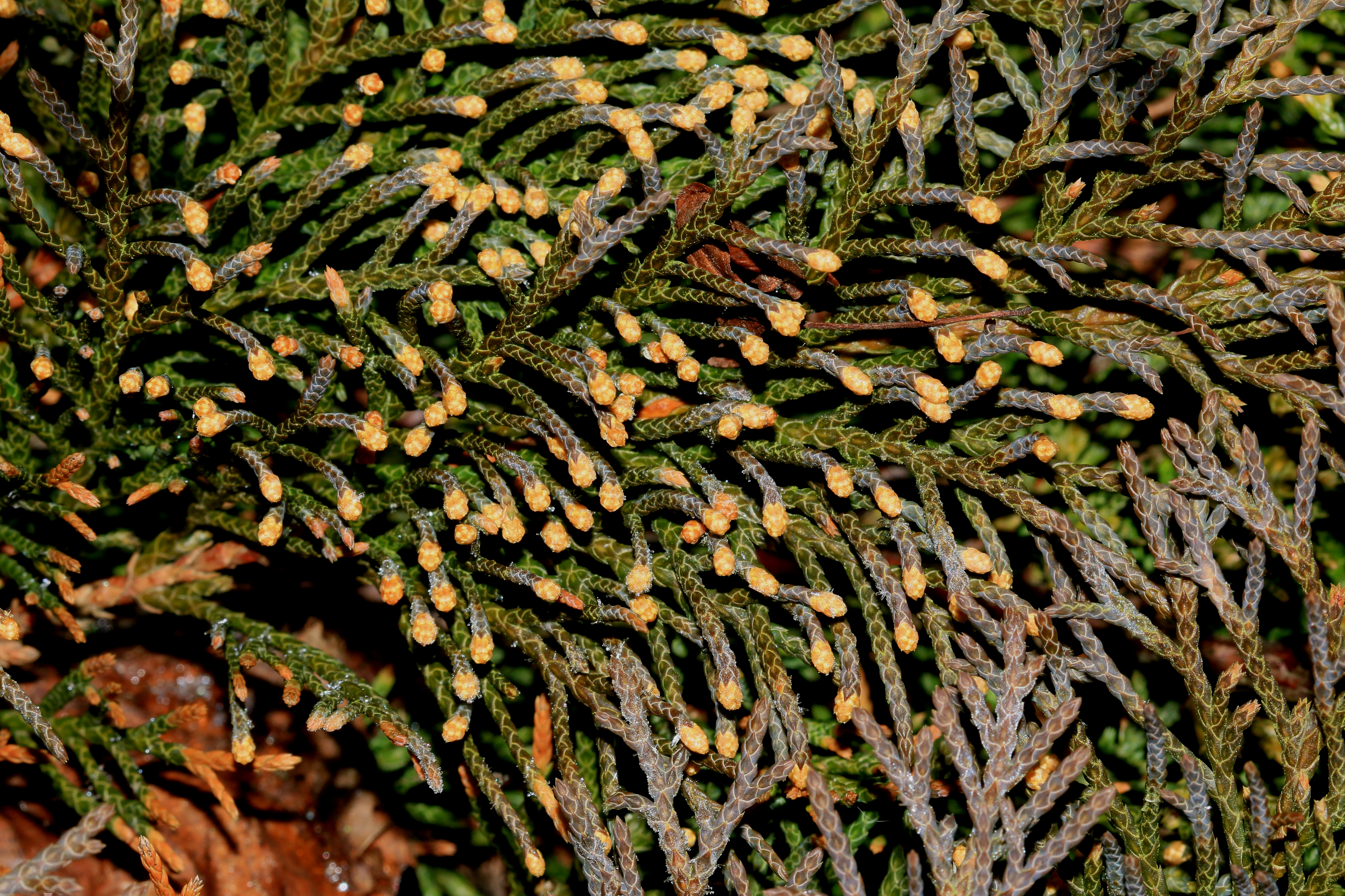 Microbiota decussata (Siberian carpet cypress, Russian arbor-vitae)